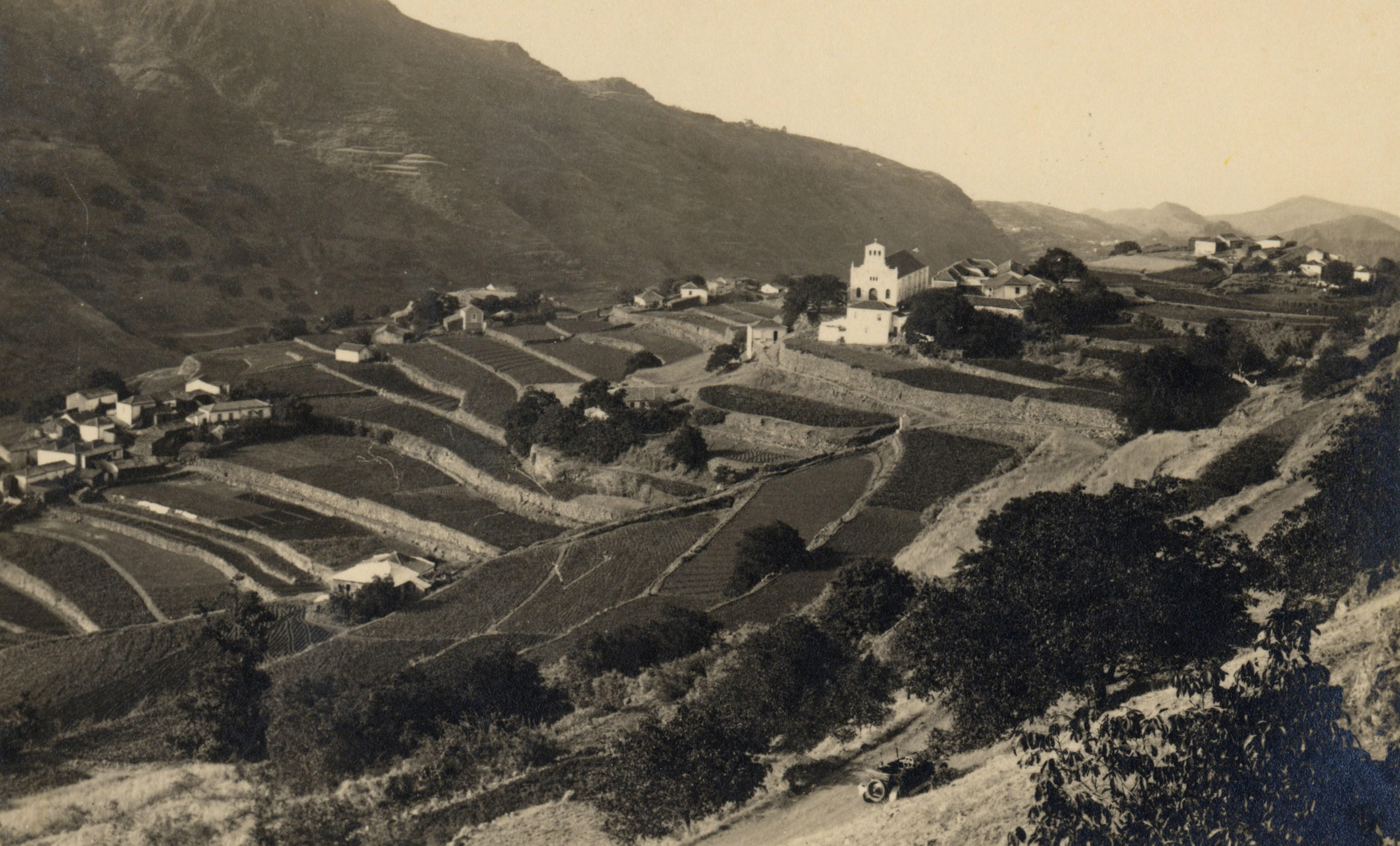 Cultivo en bancales de Las Lagunetas, San Mateo (Gran Canaria). Islas Canarias, España.